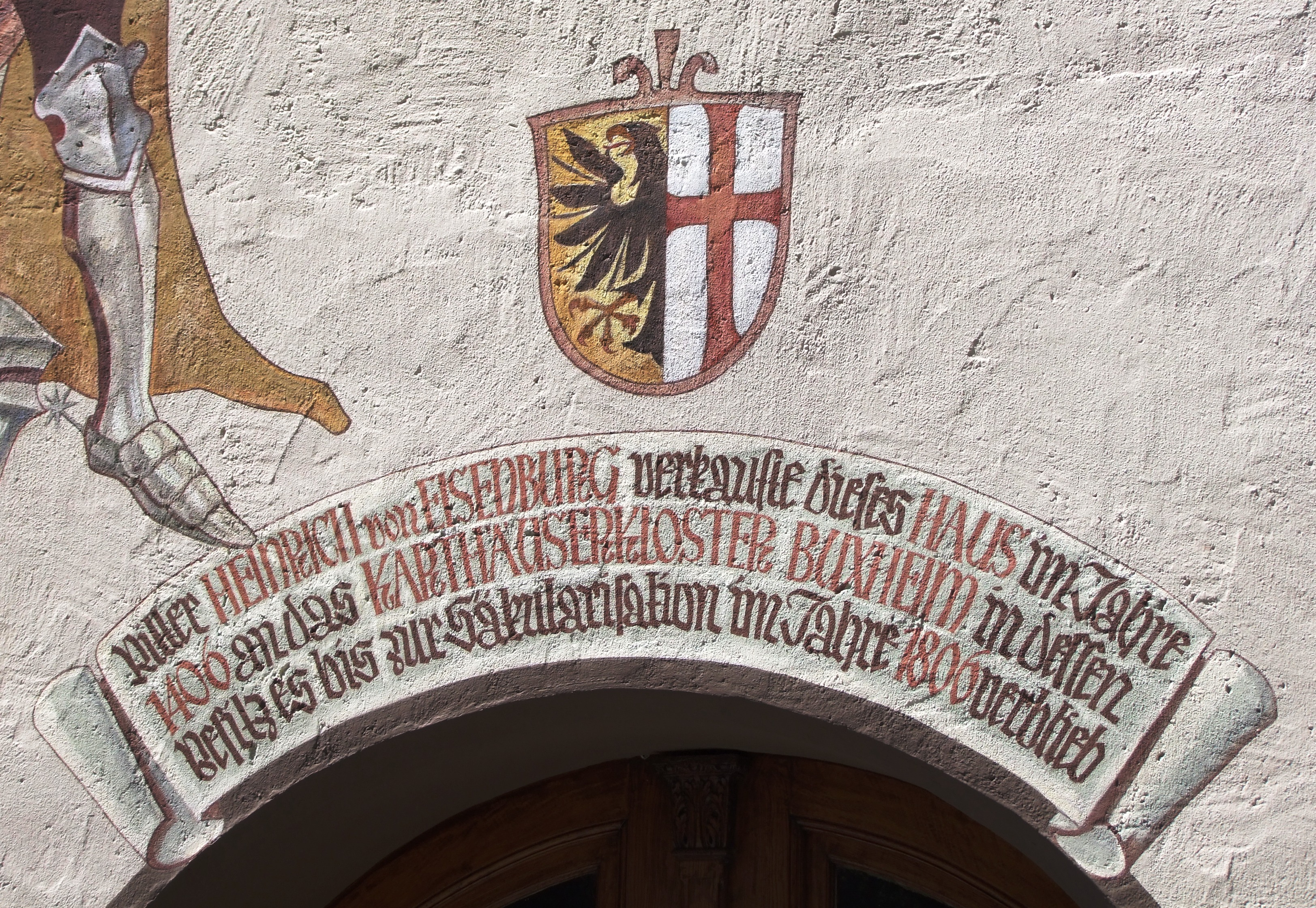 Das Buxheimer Haus in Memmingen am Martin-Luther-Platz vor der St. Martinskirche